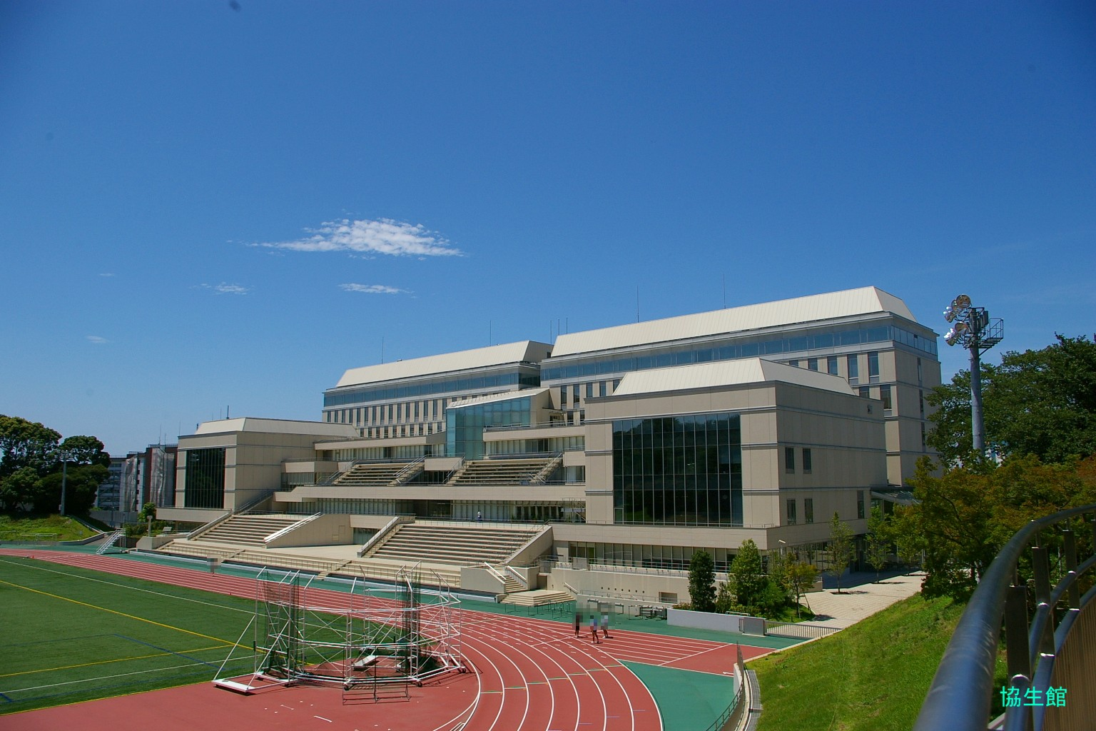 2009.5日本国内で塾生 (talk)が撮影。